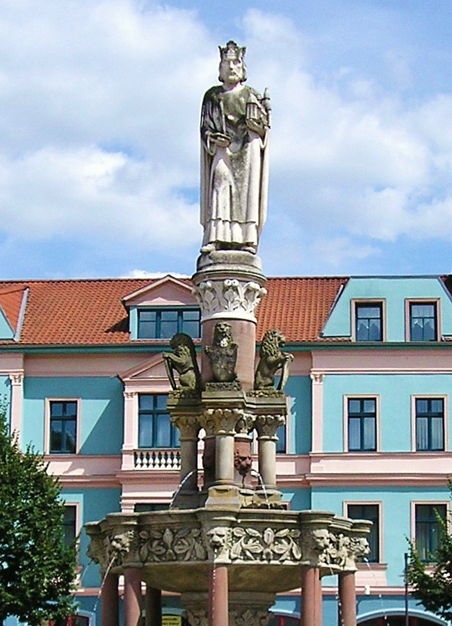 Heinrichsbrunnen in Meiningen, gewidmet dem Kaiser Heinrich II. (HRR)